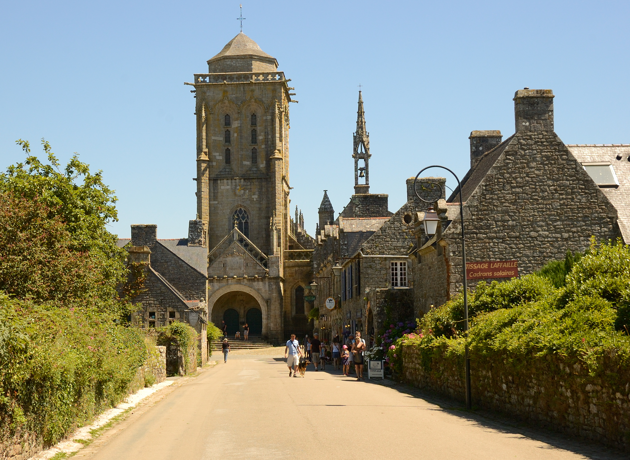 Église Saint-Ronan in Locronan, Finistére, Bretagne .